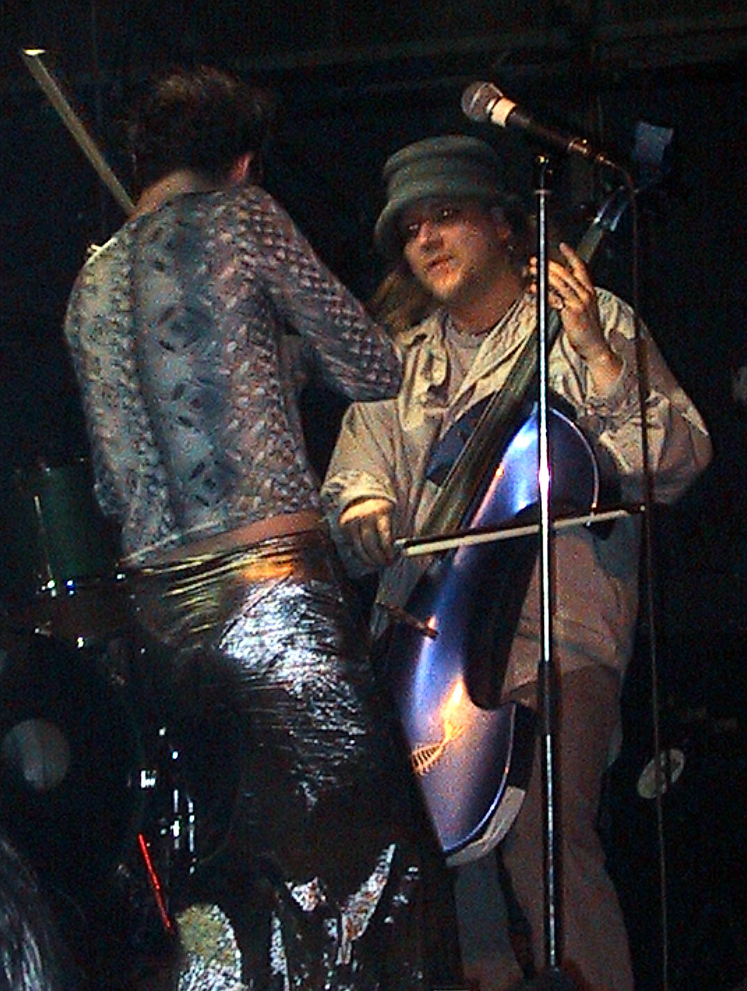 B. Deutung von der Band The Inchtabokatables in der Zeche Carl The musican B.Deutung from the Band The Inchtabokatables Date: May 2001, Essen, Germany Author: Maschinenjunge Licence: see below.